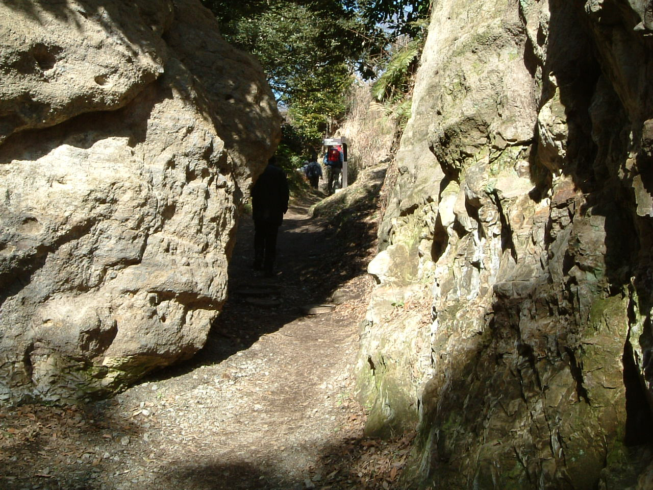 鎌倉七口の一つである名越切通しを南側（逗子側）から望む